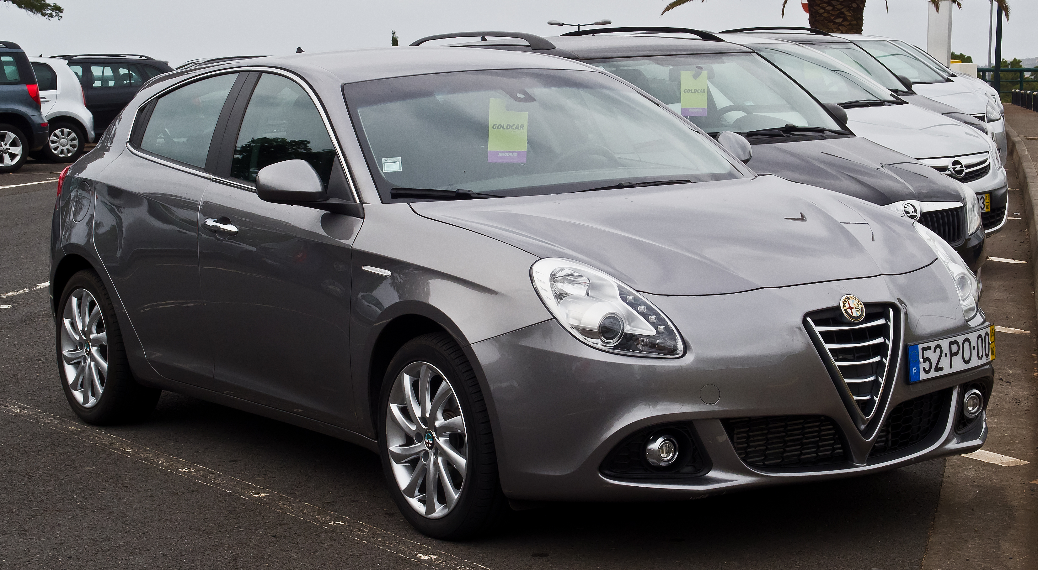 Alfa Romeo Giulietta (940, Facelift)